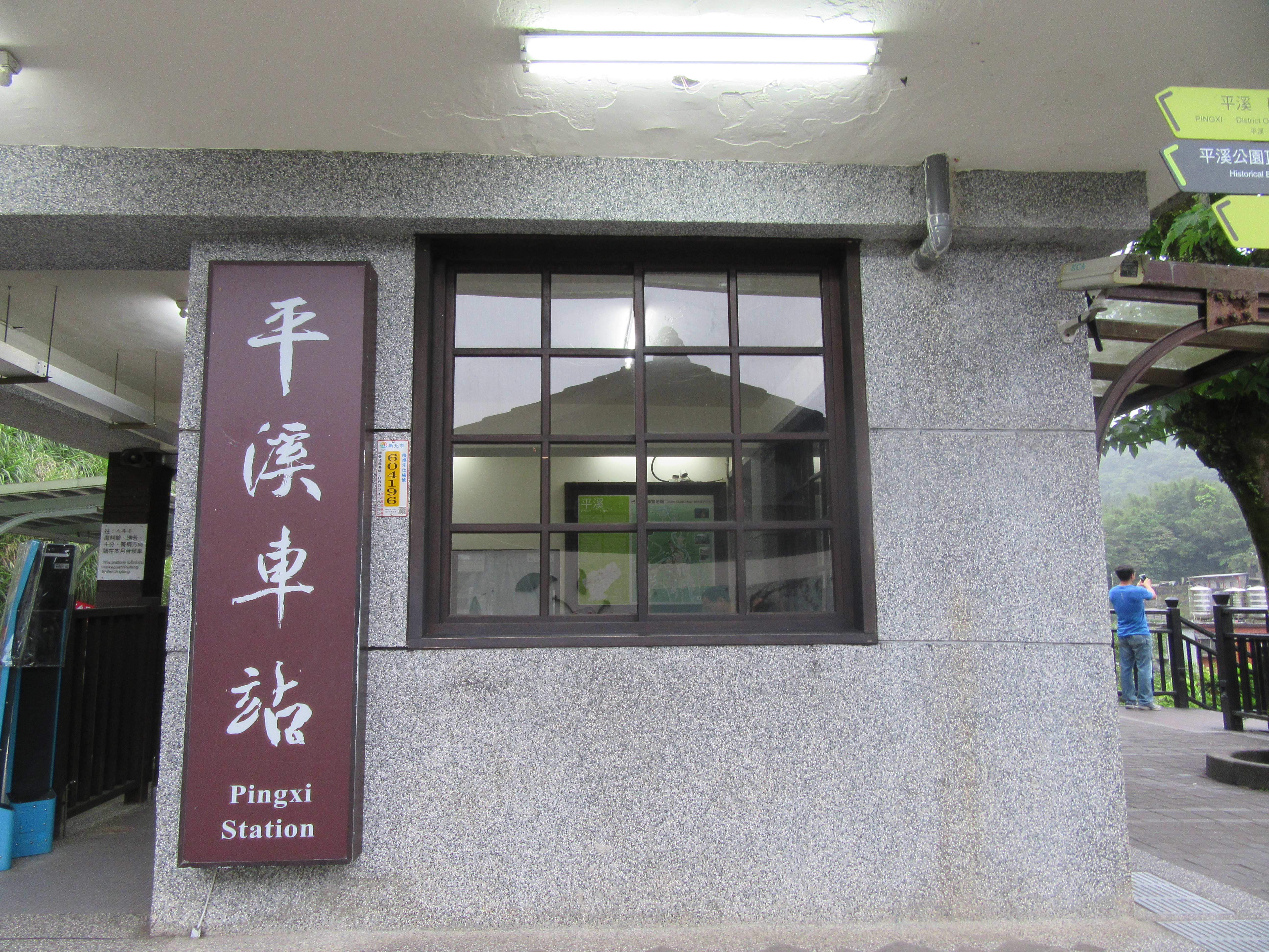 臺灣鐵路管理局平溪車站中華街側，平溪車站招牌。